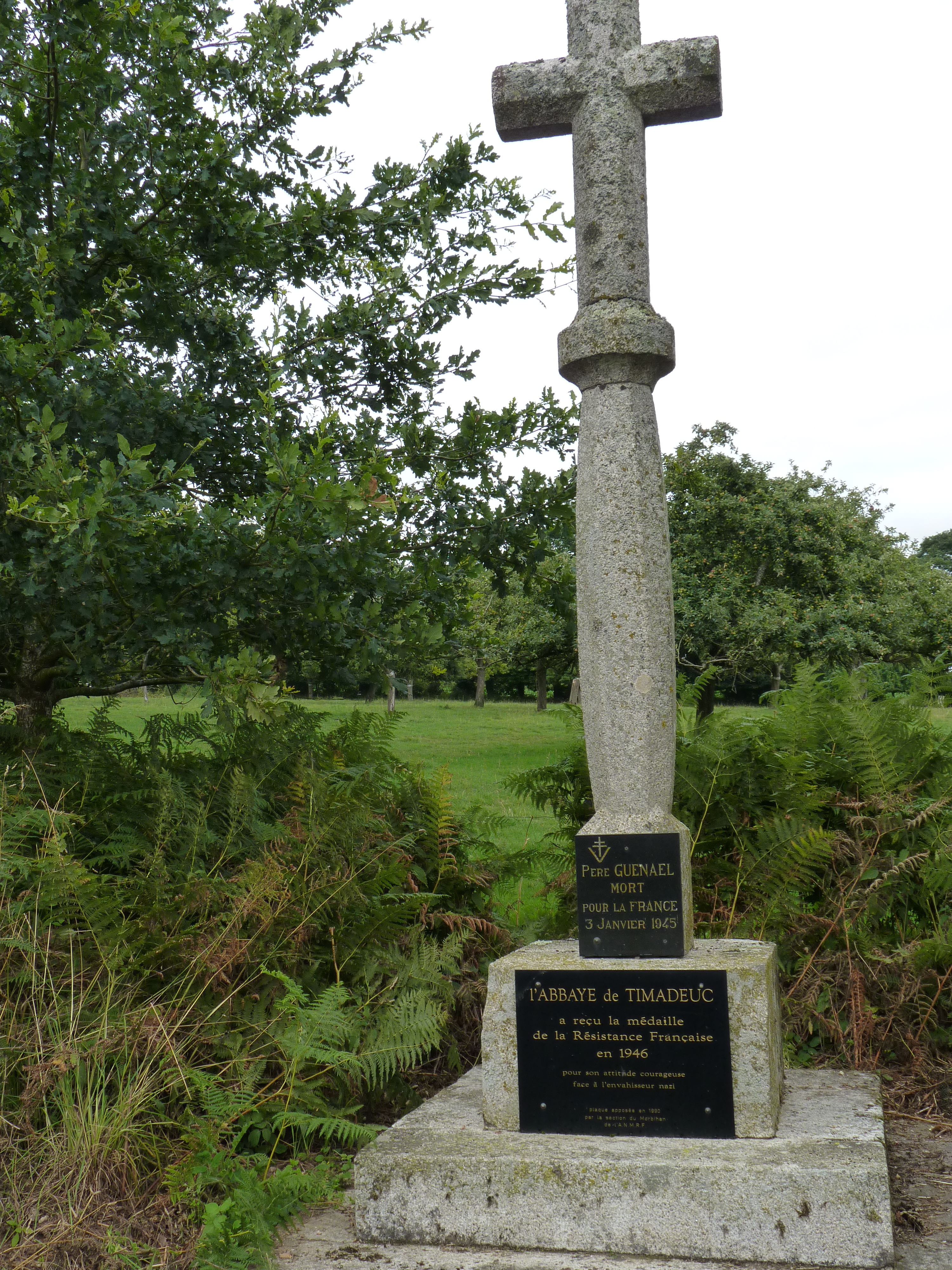 Calvaire de Timadeuc sur la Route de Timadeuc, Bréhan, France